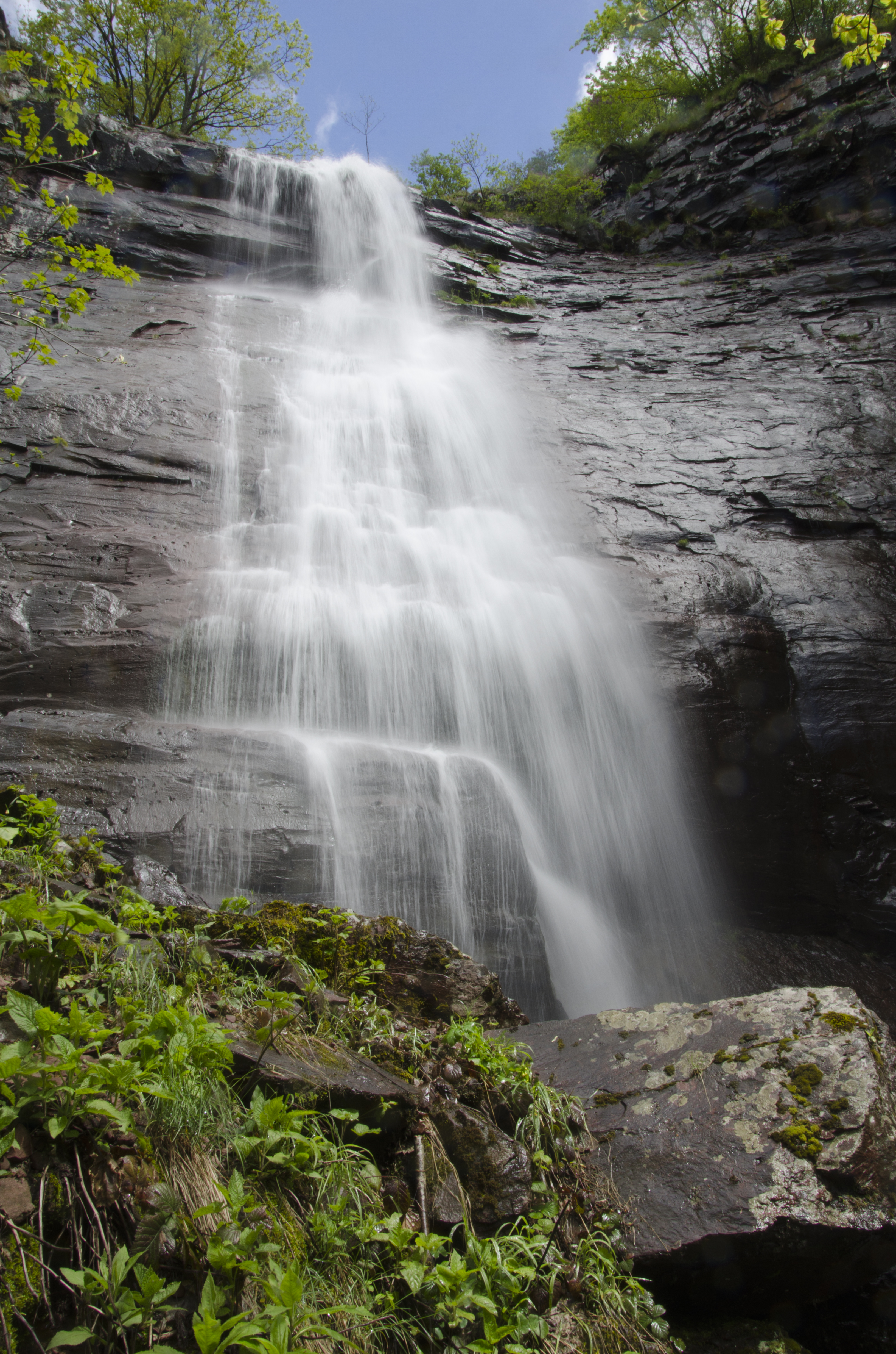 Српски (ћирилица): Ово је фотографија заштићеног природног добра у Србији под шифром: ПП16 This is a a photo of a natural area in Serbia with ID: ПП16 Чунгуљски скок (Чунгуљ, Чунгуљски водопад) је водопад у источној Србији, на Старој планини, недалеко од села Топли До. Налази се на надморској висини од око 1.400 метара на Топлодолској реци и висок је 40 метара.